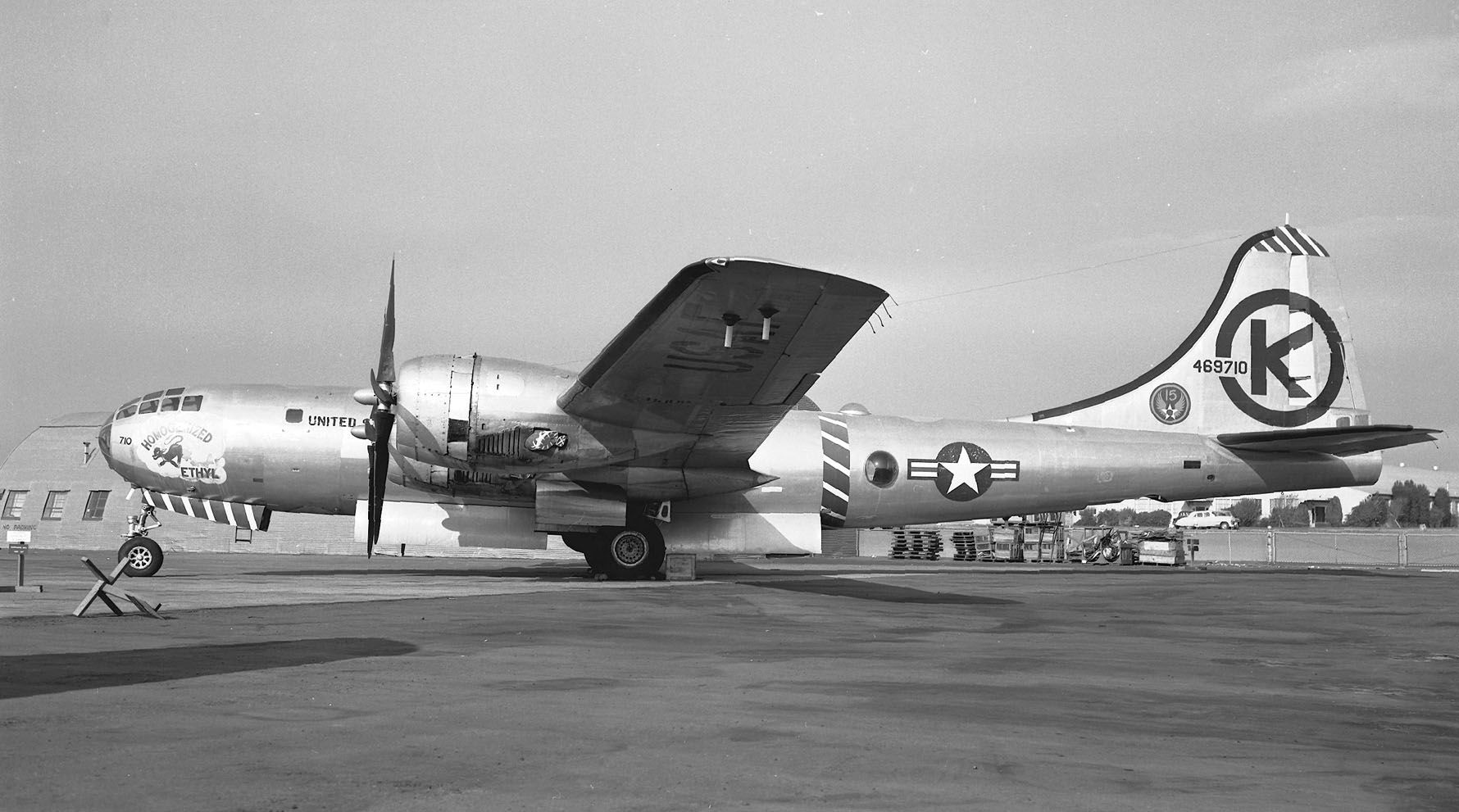 Oakland Airport 1952